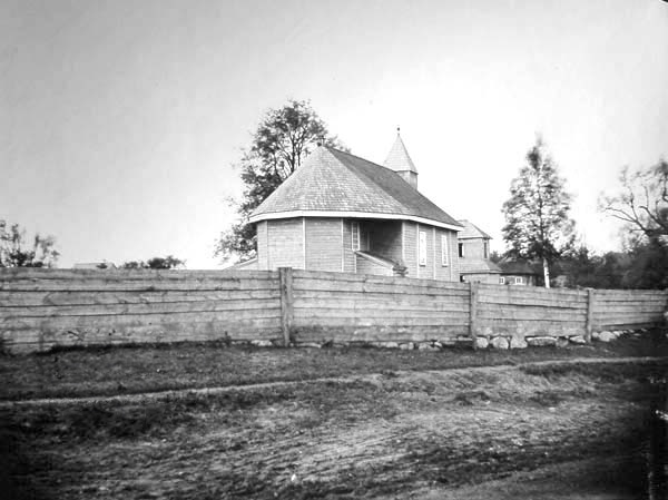 Беларуская (тарашкевіца): Стары Сьвержань (Stary Śvieržań). Царква